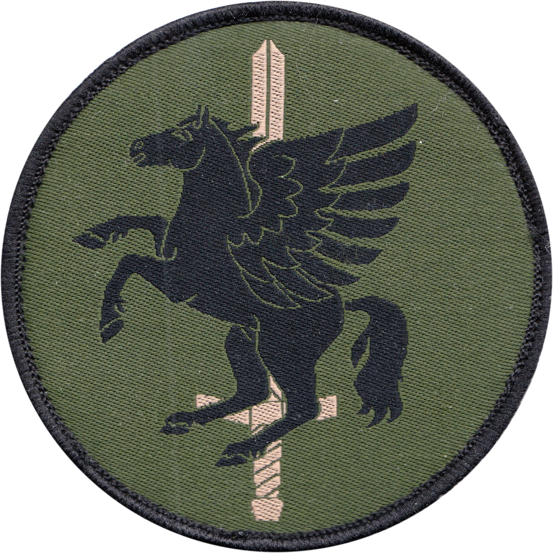 Helikopterflottiljens förbandstecken i textil. Bärs av personal tjänstgörande vid Helikopterflottiljen på vänster ärm till jackor i stridsuniformssystemet.